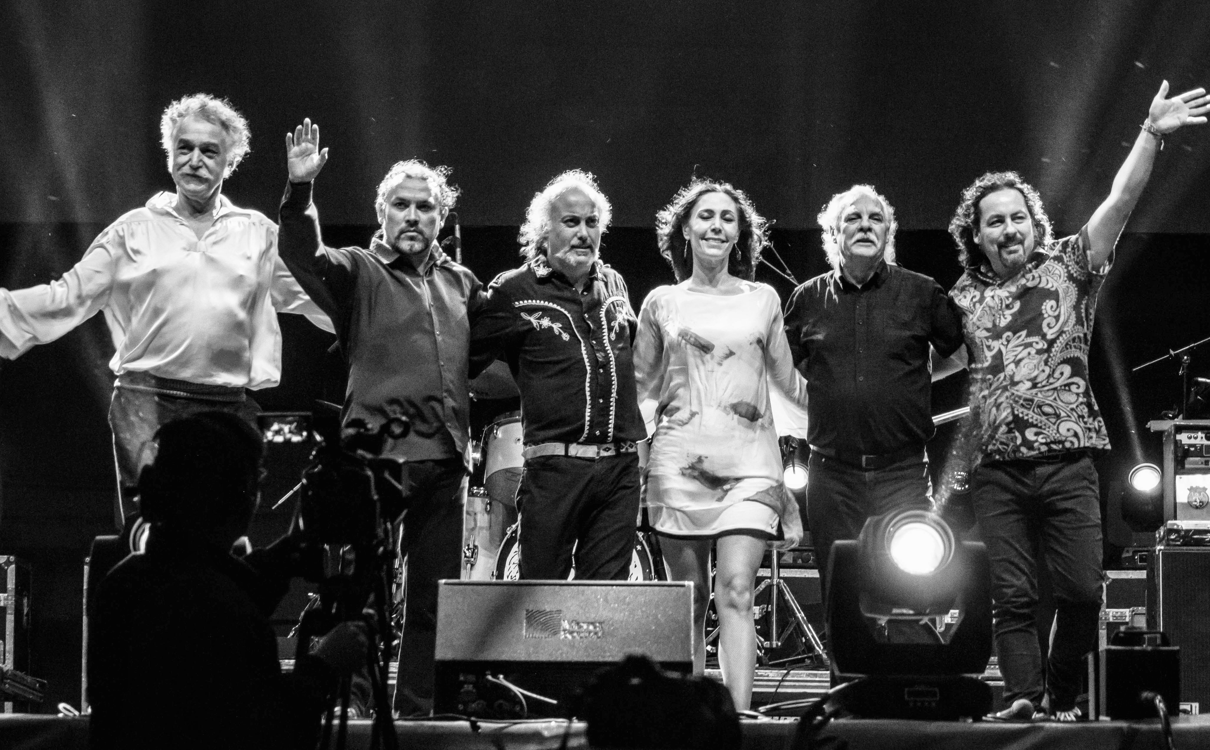 Los Jaivas Rock En Conce (REC) 2017